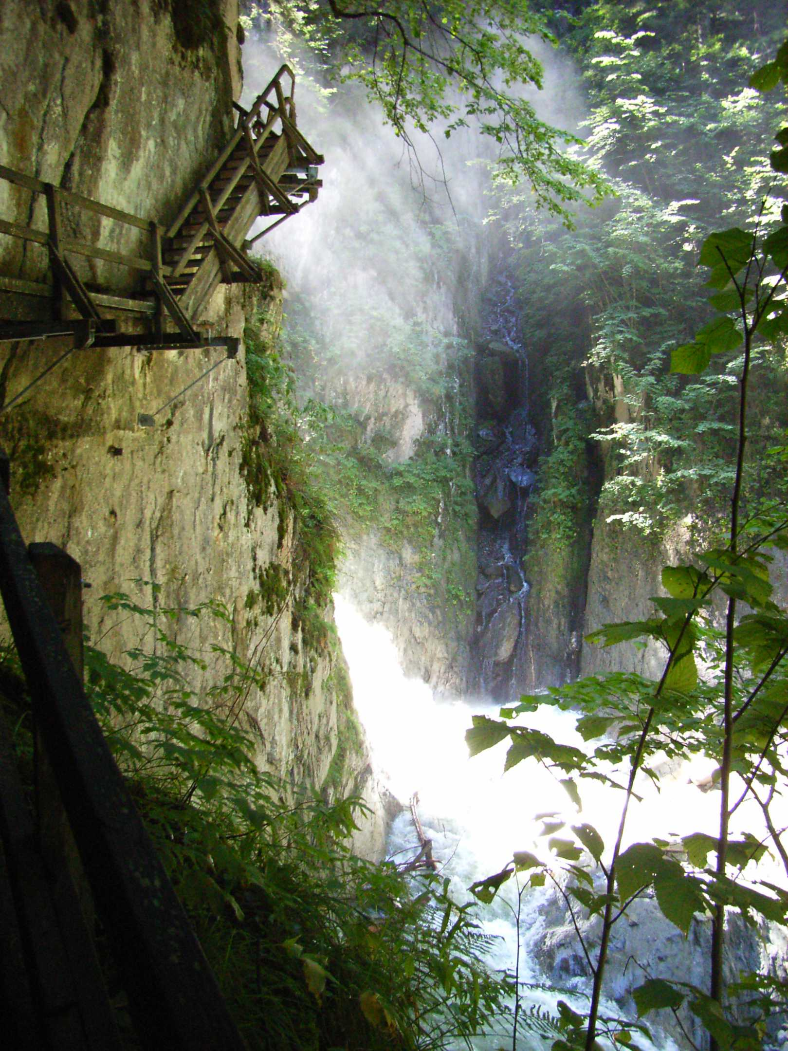 Gorges du Durnand, Schweiz/Valais